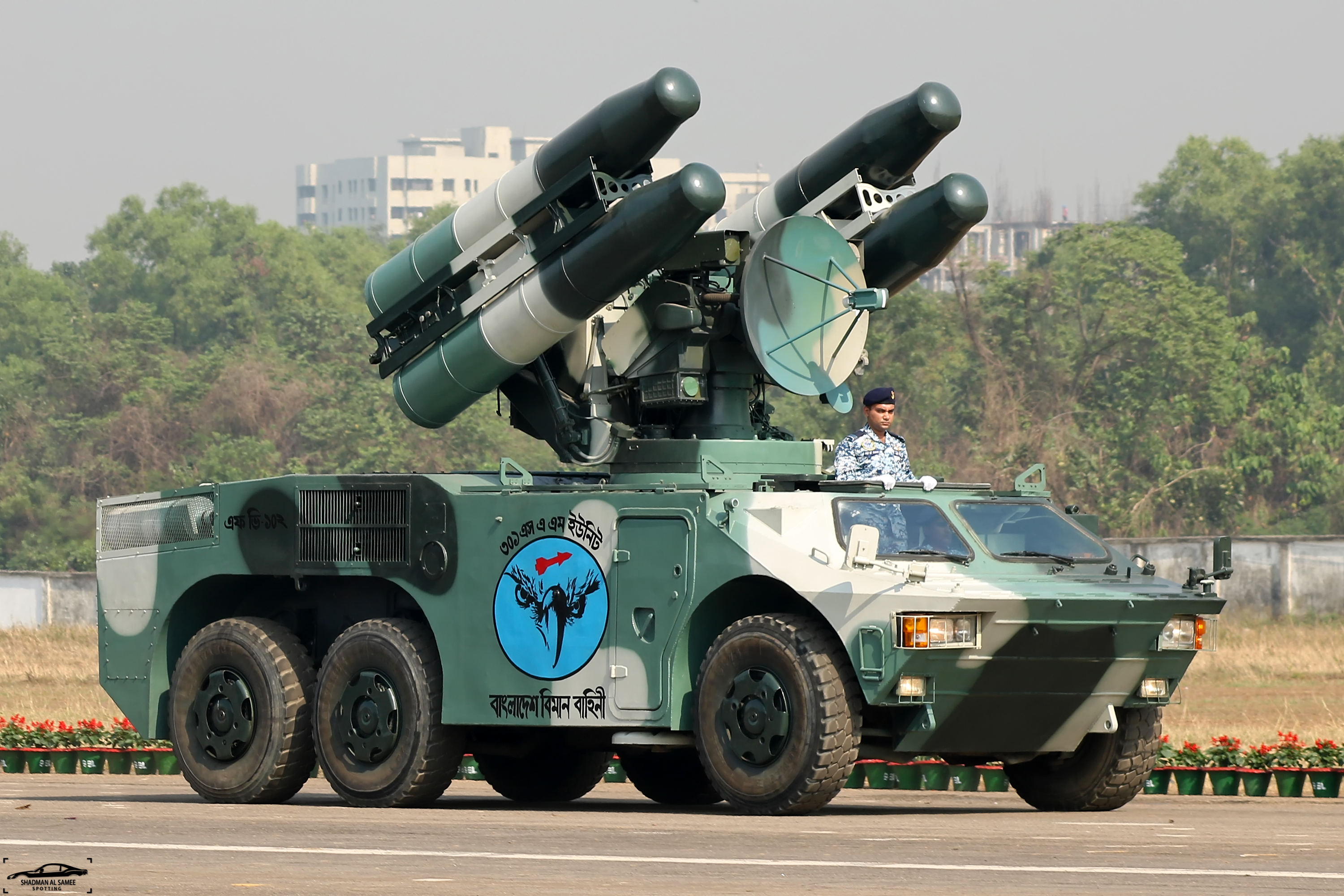 VGTJ/ VDP2017.